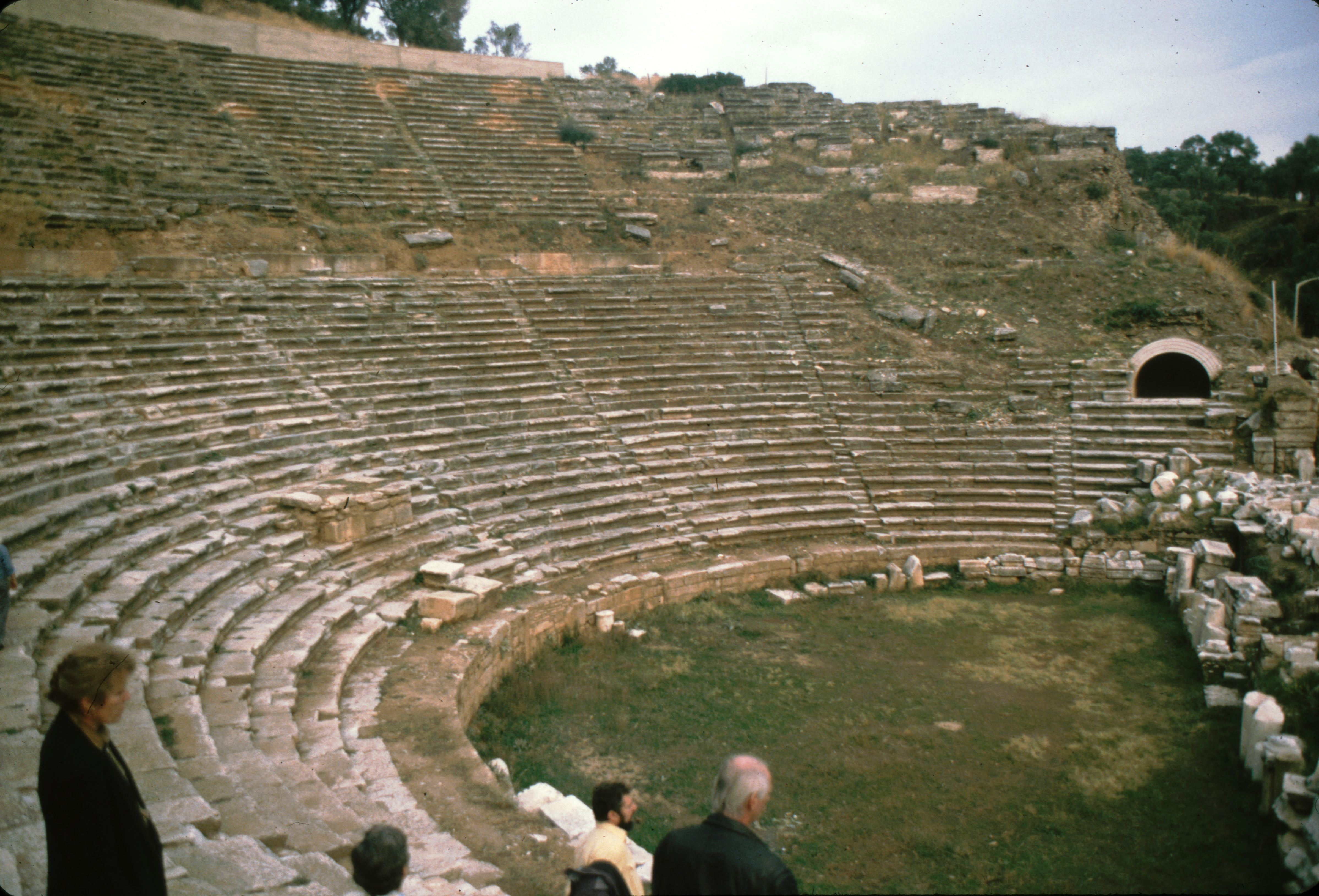 Theater von Nysa